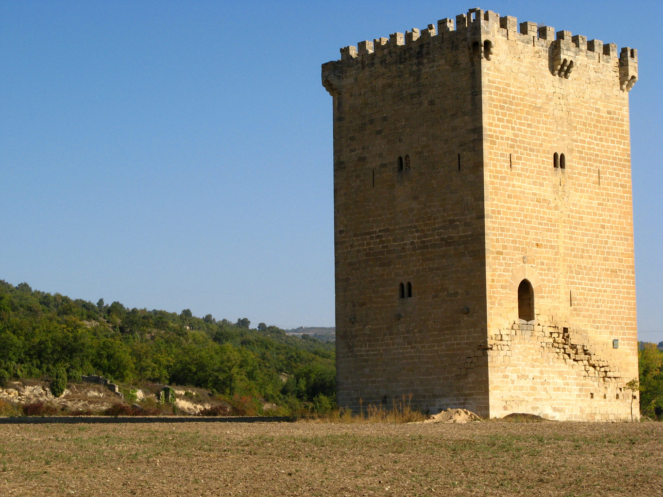 Torre de Orgaz, Fontecha, Lantarón, Alava, País Vasco.